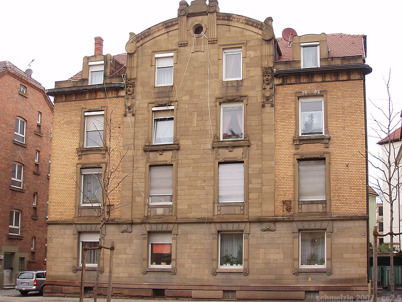 Gebäude Südstraße 129-131 in Heilbronn, denkmalgeschütztes Gebäude, Jugendstilfassade mit Maskenköpfen